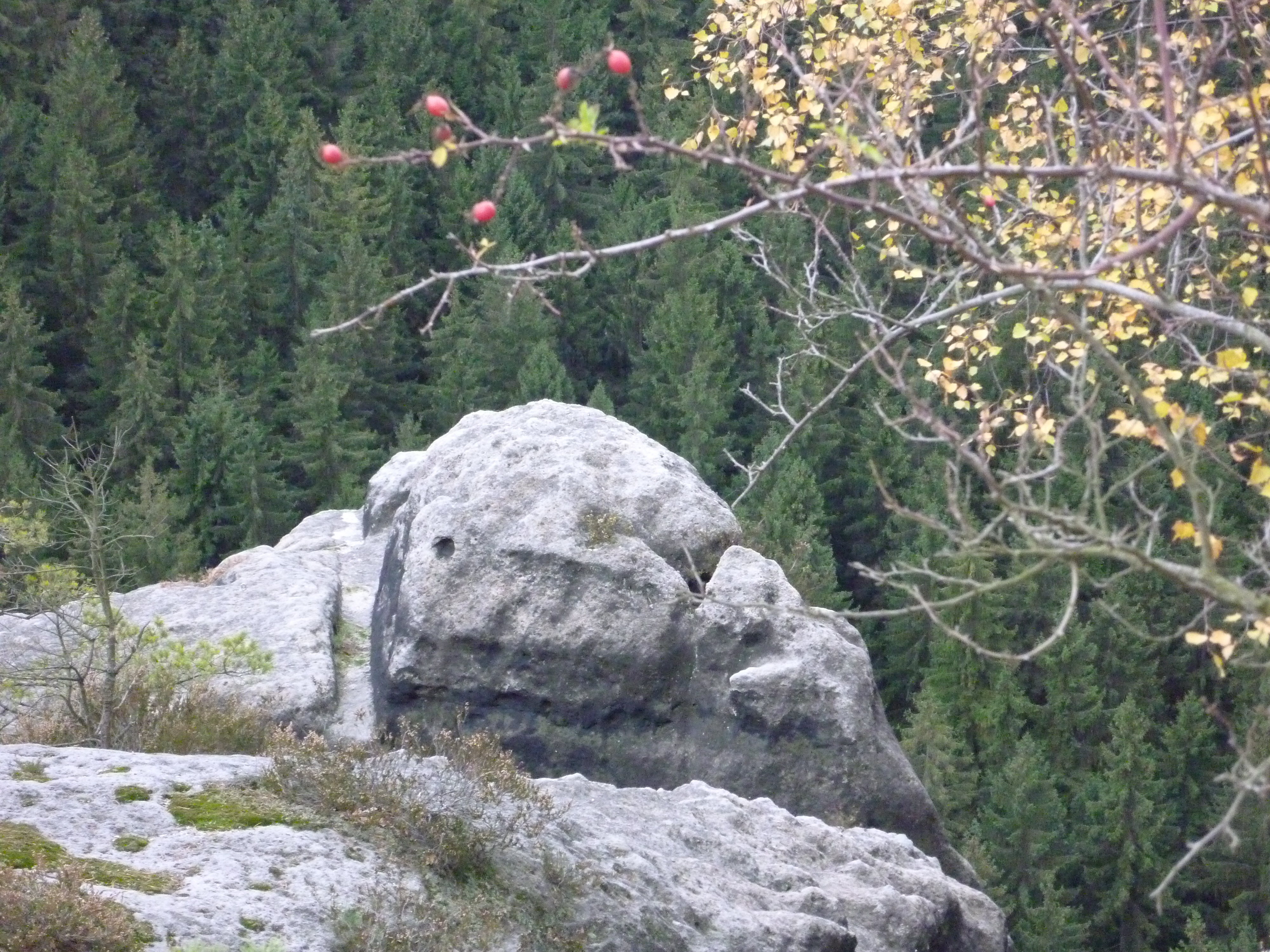 Balkenfalze als Fundament für den ehemaligen Lastenaufzug oder Kran der Felsenburg